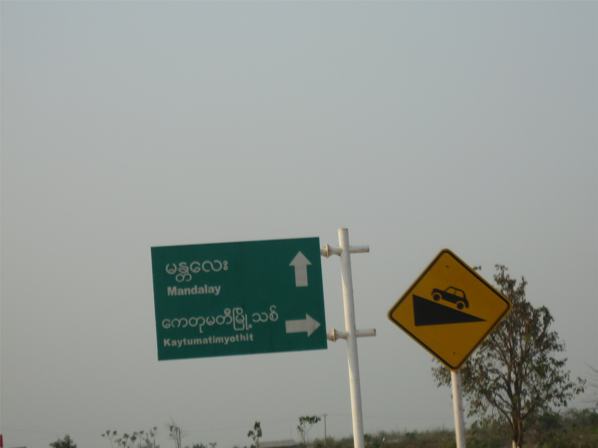 Verkehrhinweisschild auf dem Yangon-Mandalay Expressway, Myanmar (Birma).